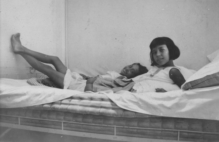 Repronegatief. Portret van twee Indo-Europese meisjes in bed